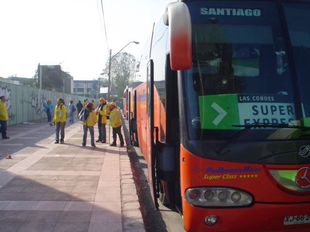 Super Expreso Transantiago